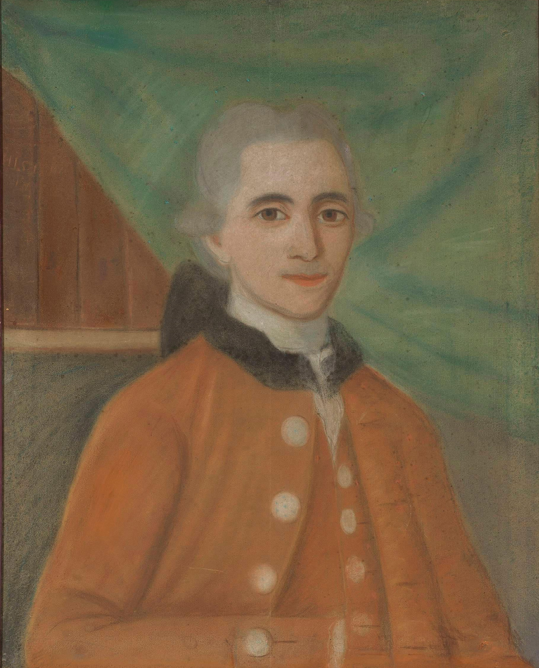 Autorką portretu mogła być córka Merliniego, Cecylia 1 voto Duchene, 2 voto Wyganowska (1771-po 1801)